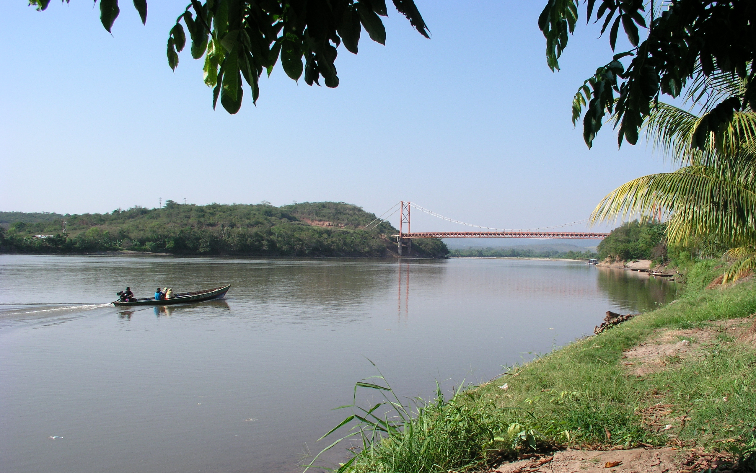 El Rio Huallaga y el puente Picota, San Martin, Peru.